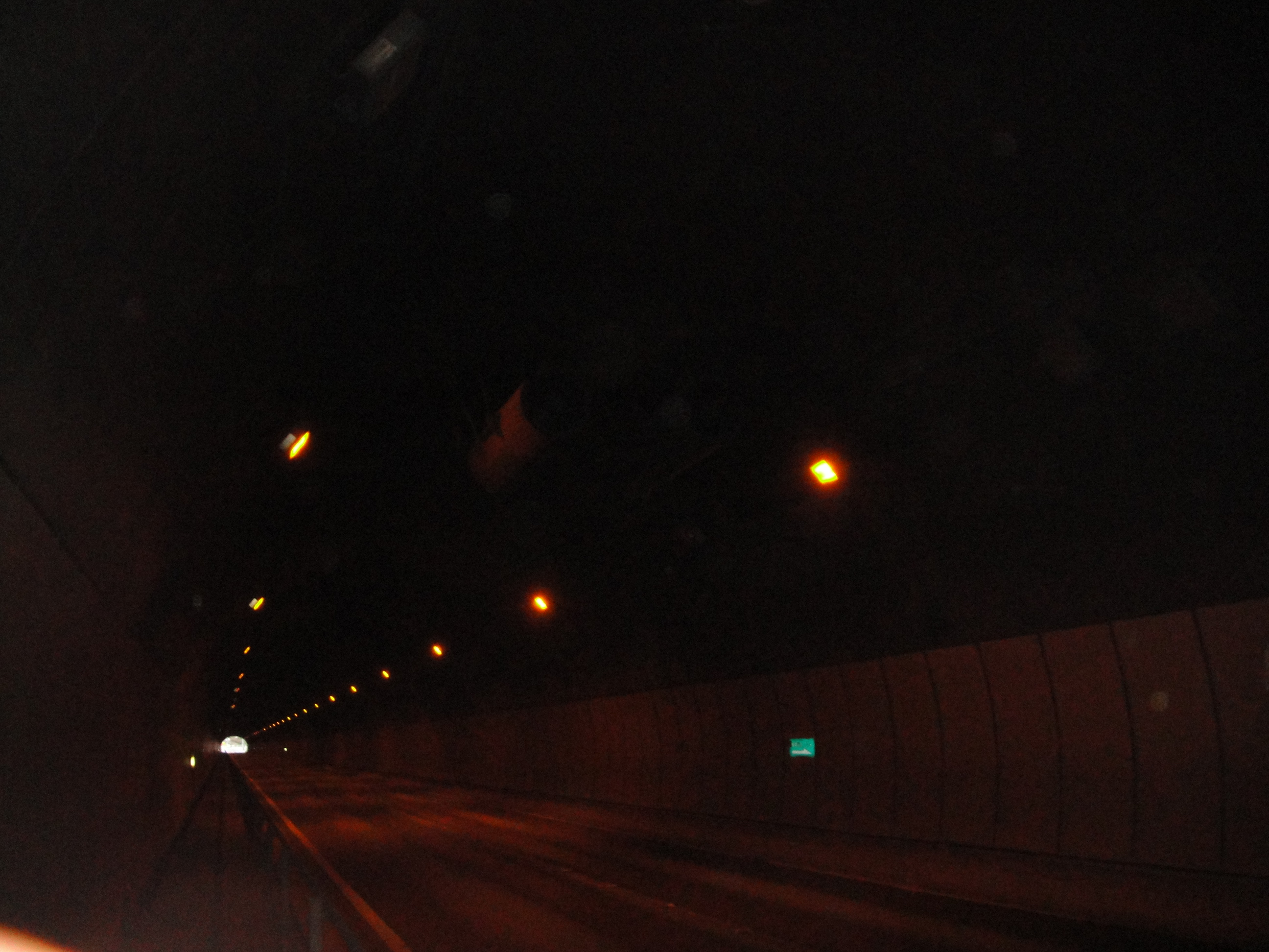 東京都青梅市成木〜黒沢の新吹上トンネル